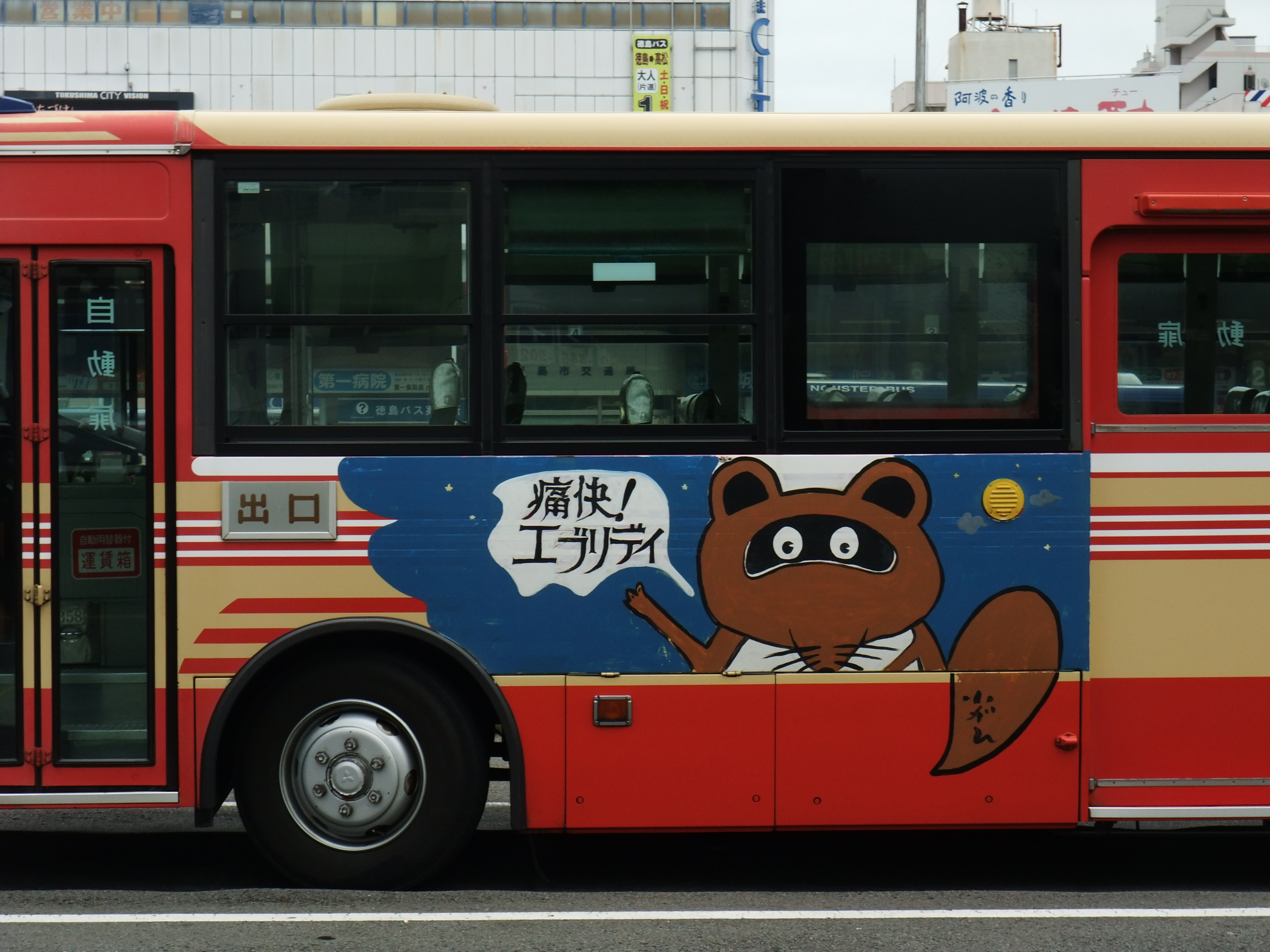 現存する唯一の痛快!エブリディのバス（小松島市営バス）